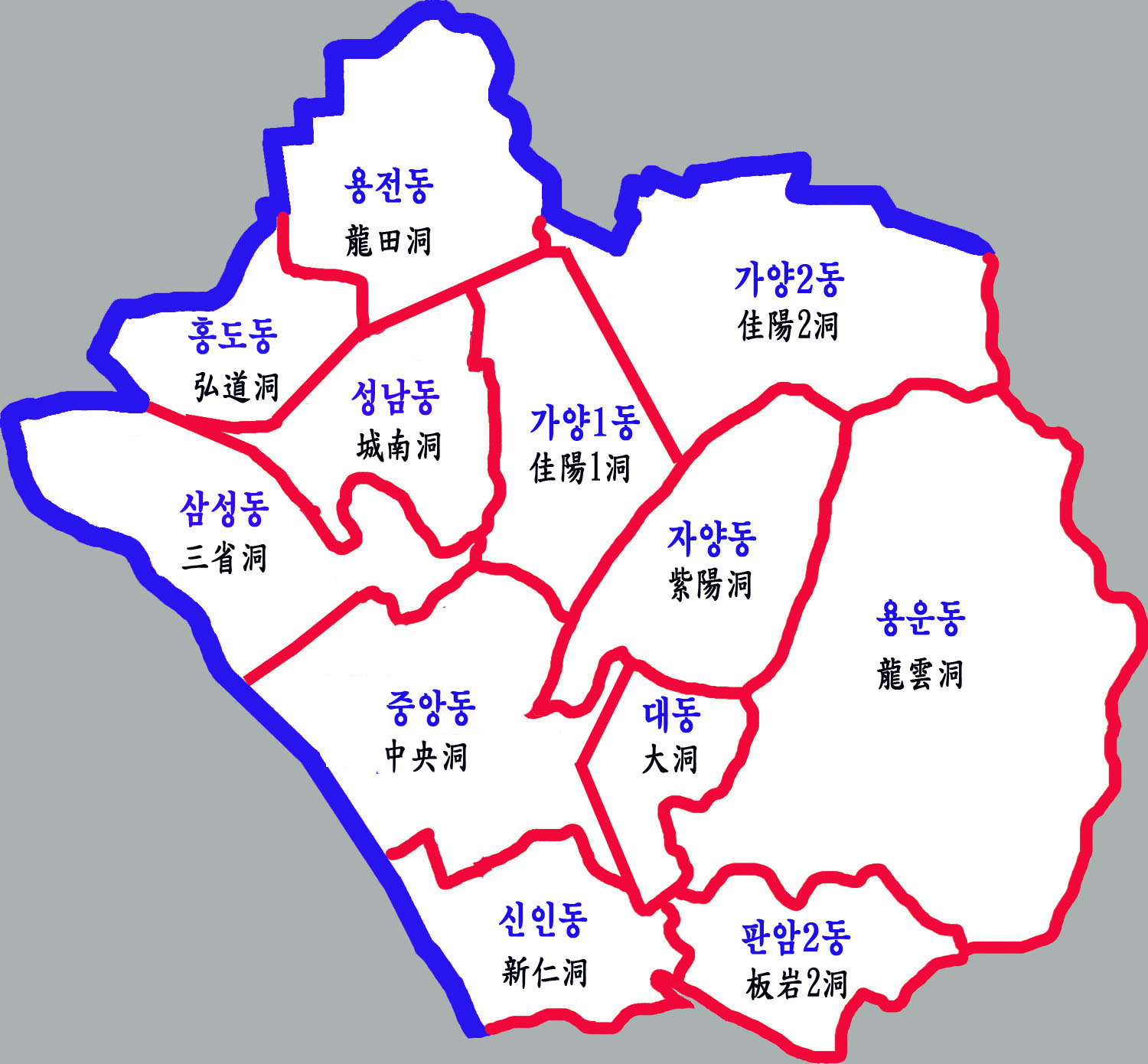 대전시 동구 중요지역도